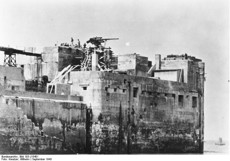 Flakfestung im Meer Mitten im Kanal ragt aus der Tiefe des Meeres ein Castell wie eine Überrest aus grauem Mittelalter. In der Nähe aber entpuppt sich das scheinbar alte Gemäuer als eine moderne Festung aus Eisen und Beton, eines der mächtigen Vorwerke des Atlantikwalls, bestückt mit Flakabwehrwaffen aller Kaliber. PK-Aufnahme: Kriegsberichter Kreutzer 16.9.43 [Herausgabedatum]